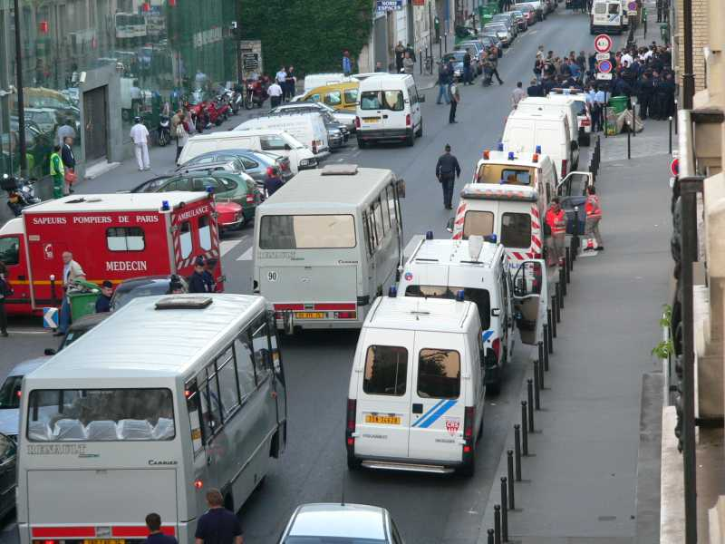 Evacuation du squat au 22 rue de la Tombe Issoire Paris XIV le vendredi 2 septembre 2005.